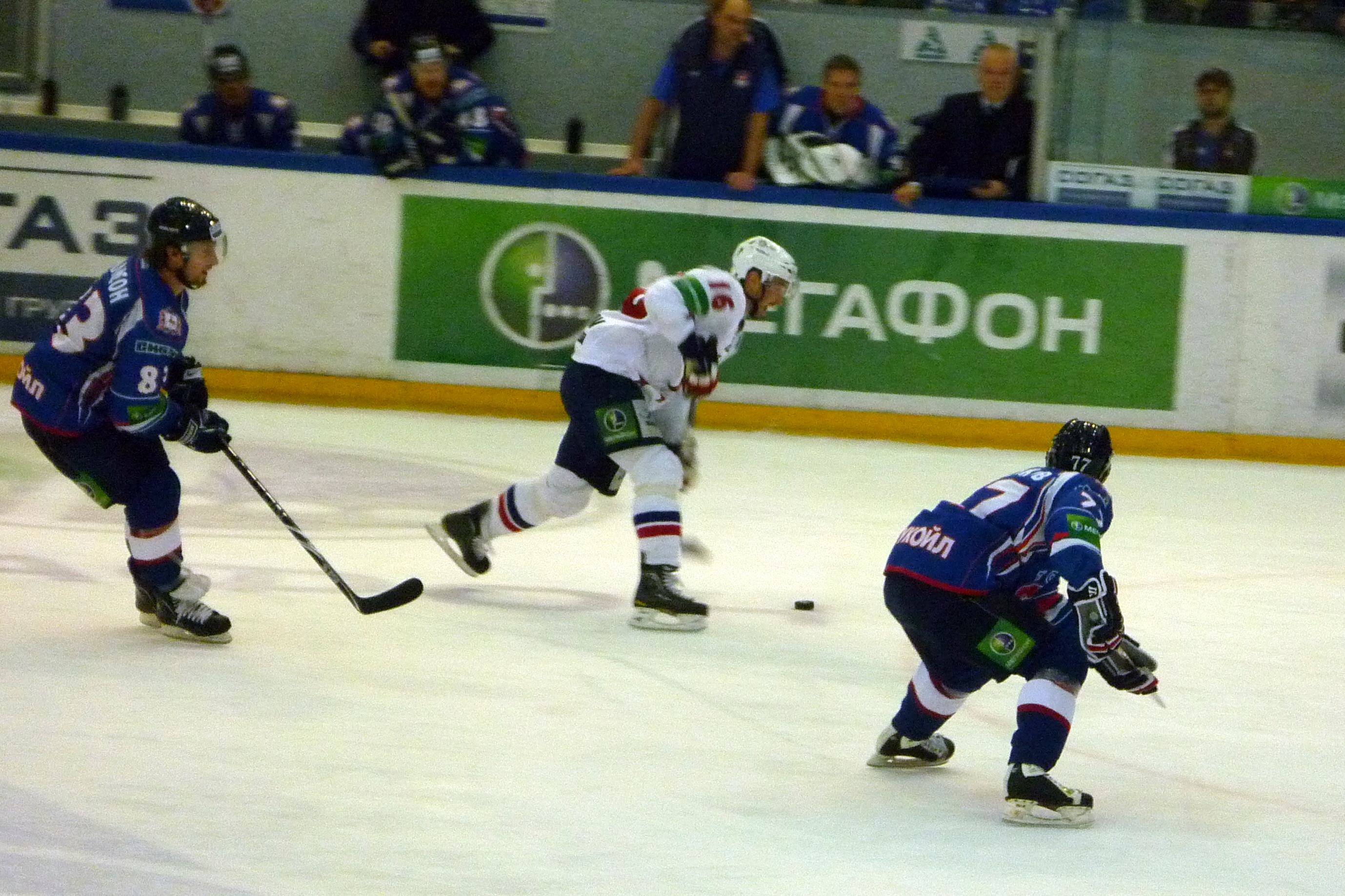 Нападающий питерского СКА Петр Чаянек совершает щелчок по воротам нижегородского «Торпедо» в матче 12 декабря 2010 года